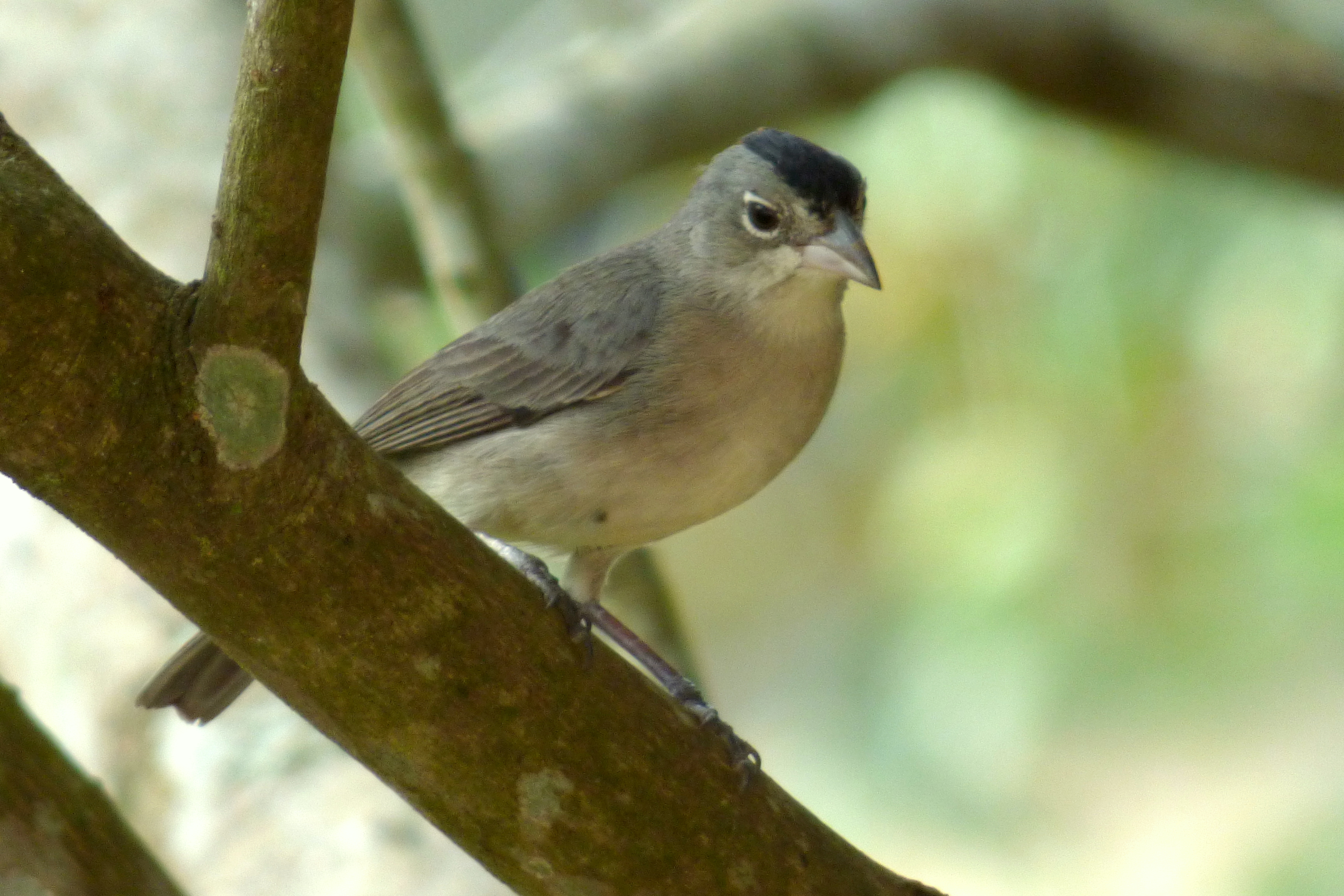 Coryphospingus pileatus